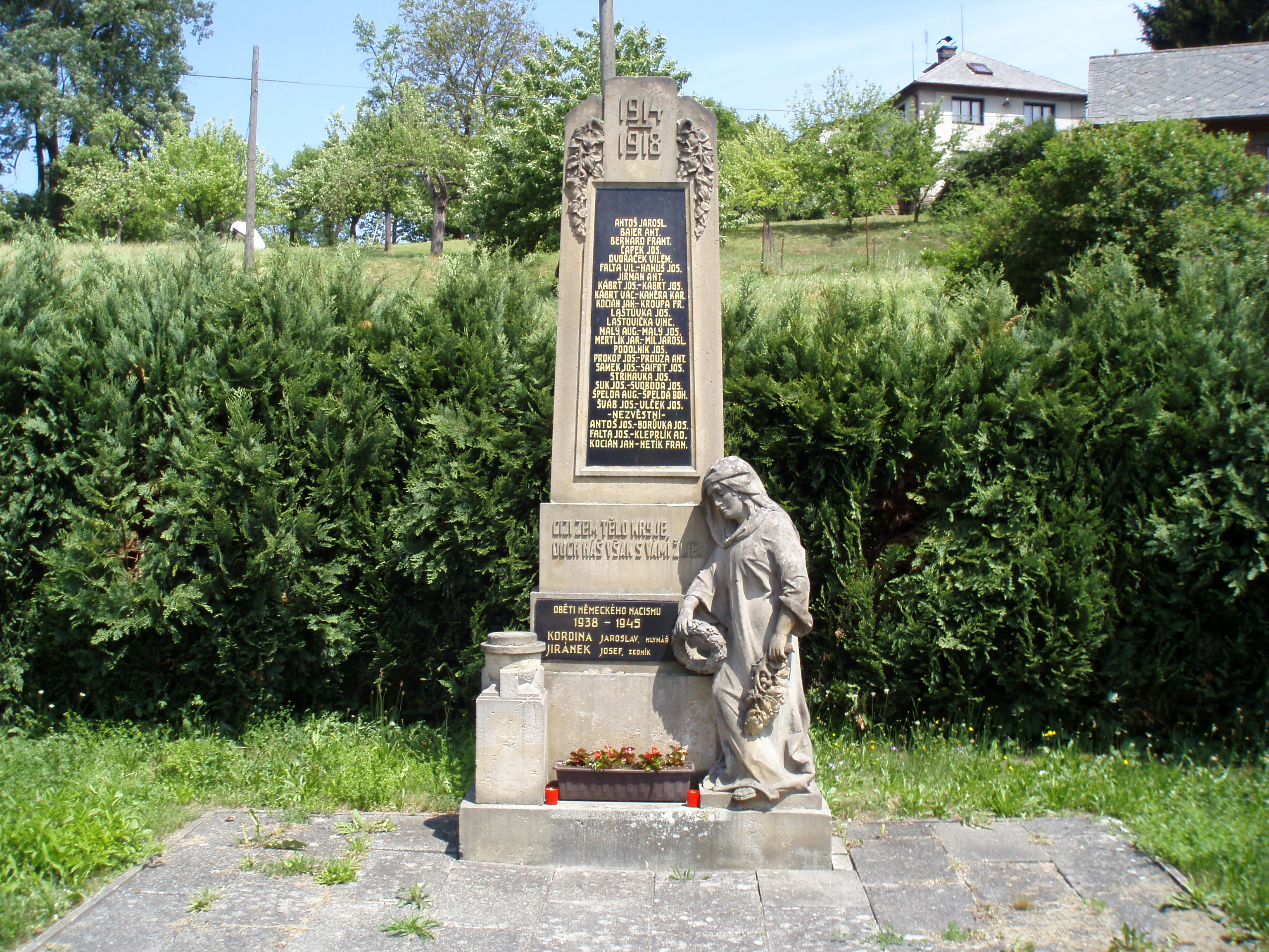 Pomník padlým ve Slatině nad Úpou